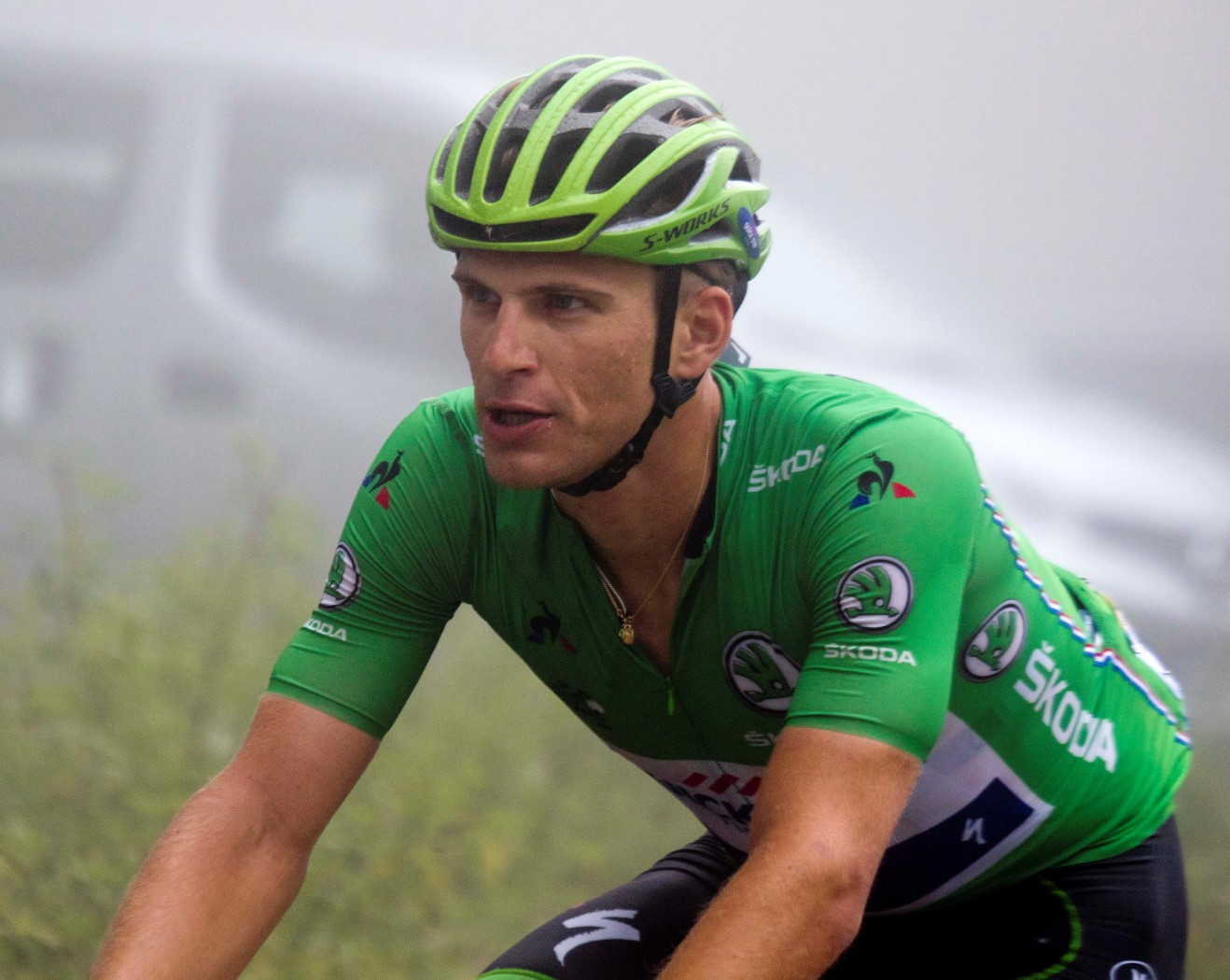 13-7_2 marcel kittel